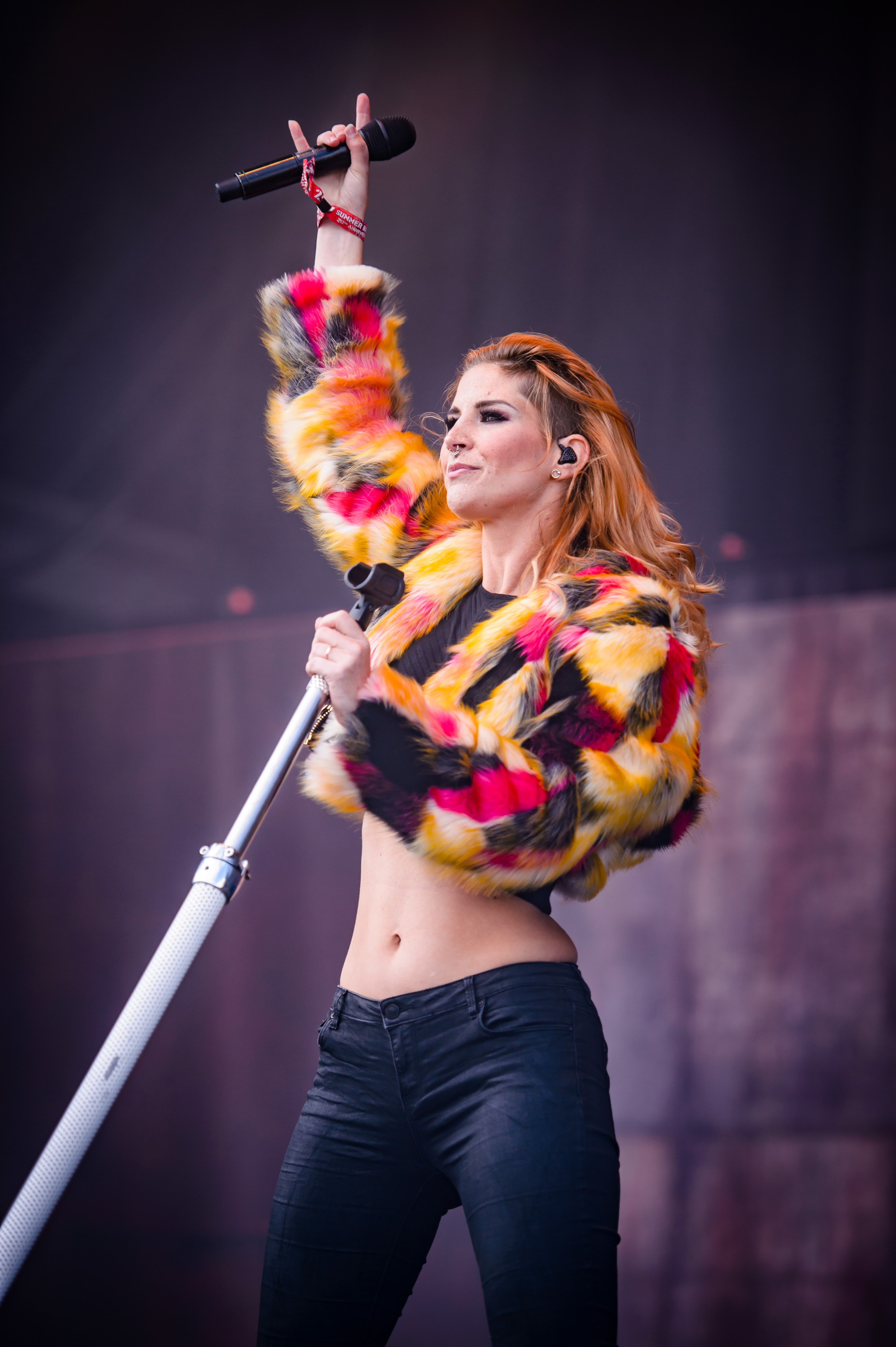 'Summer Breeze Festival 2017; Dinkelsbühl': 'Delain'